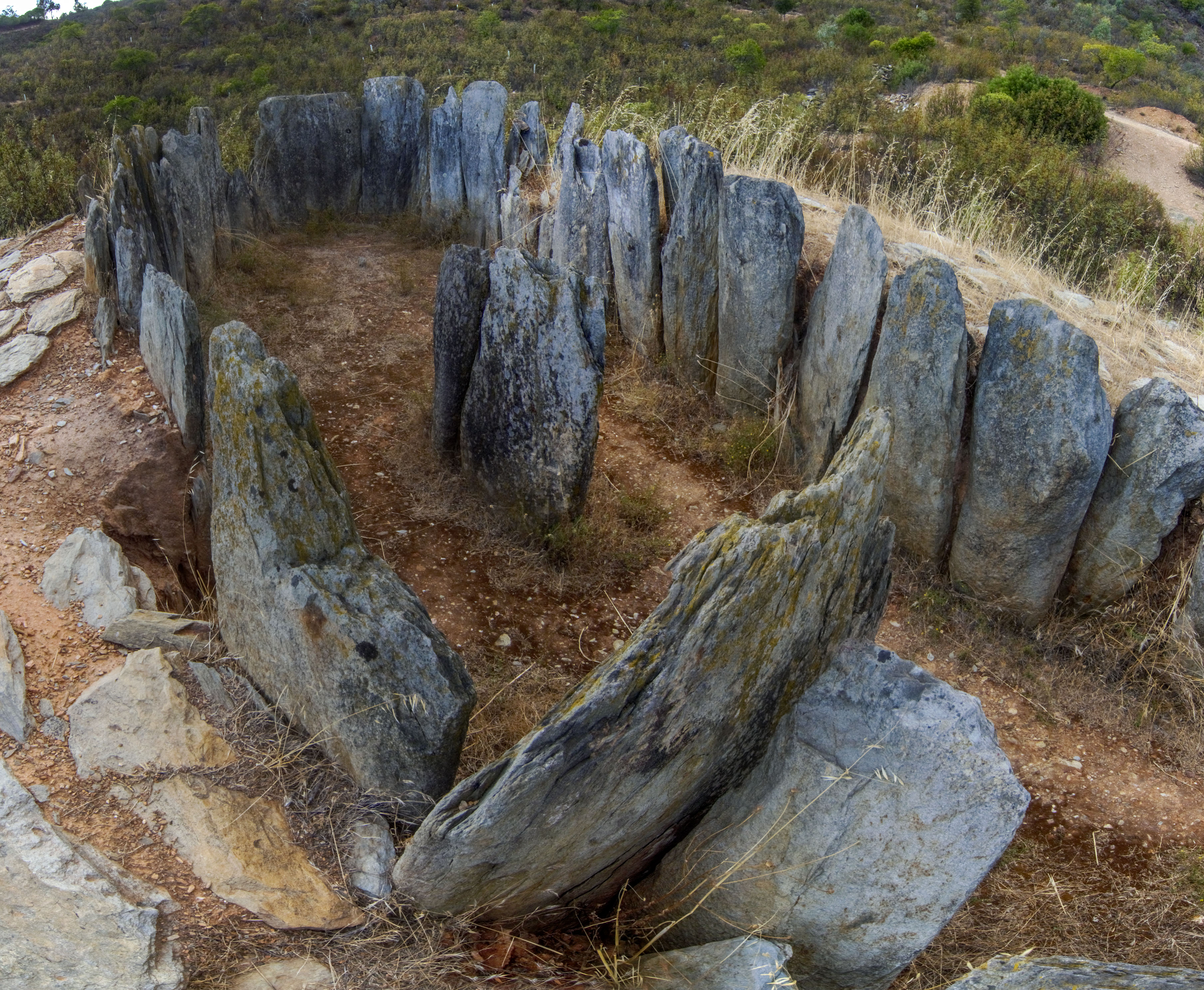 El Pozuelo, Zalamea la Real, Huelva.